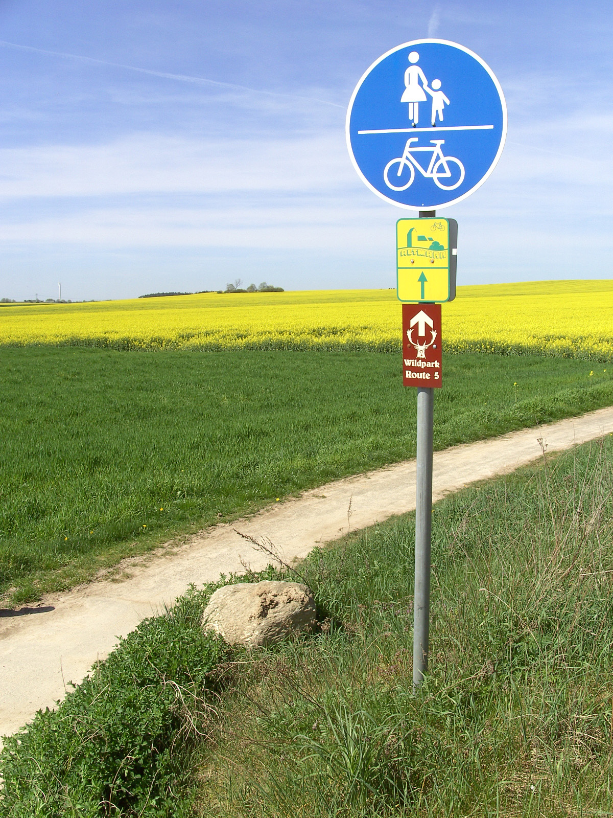 Hinweisschild des Altmarkrundkurses bei Demker